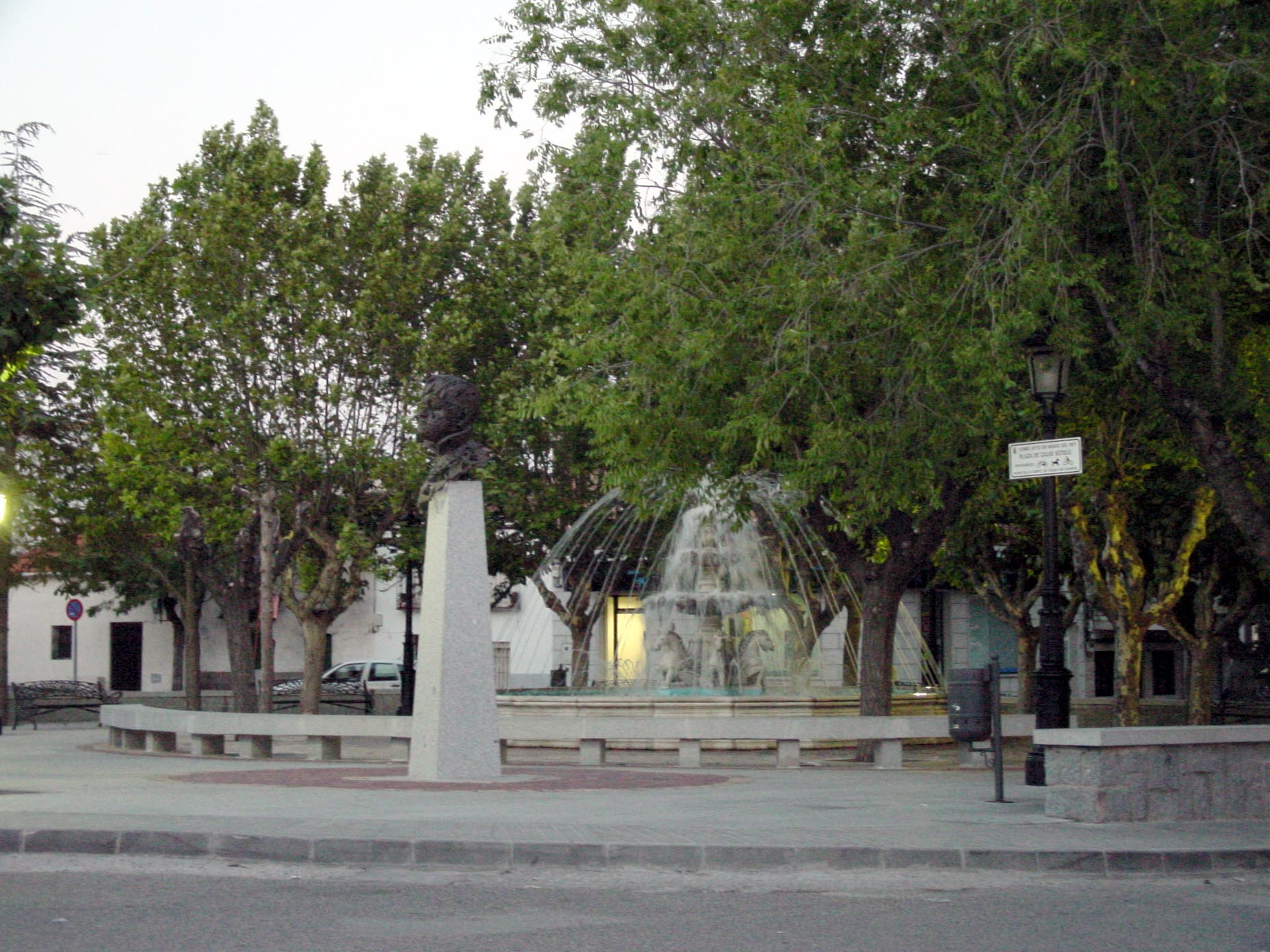 Plaza con fuente en Navas del Rey.